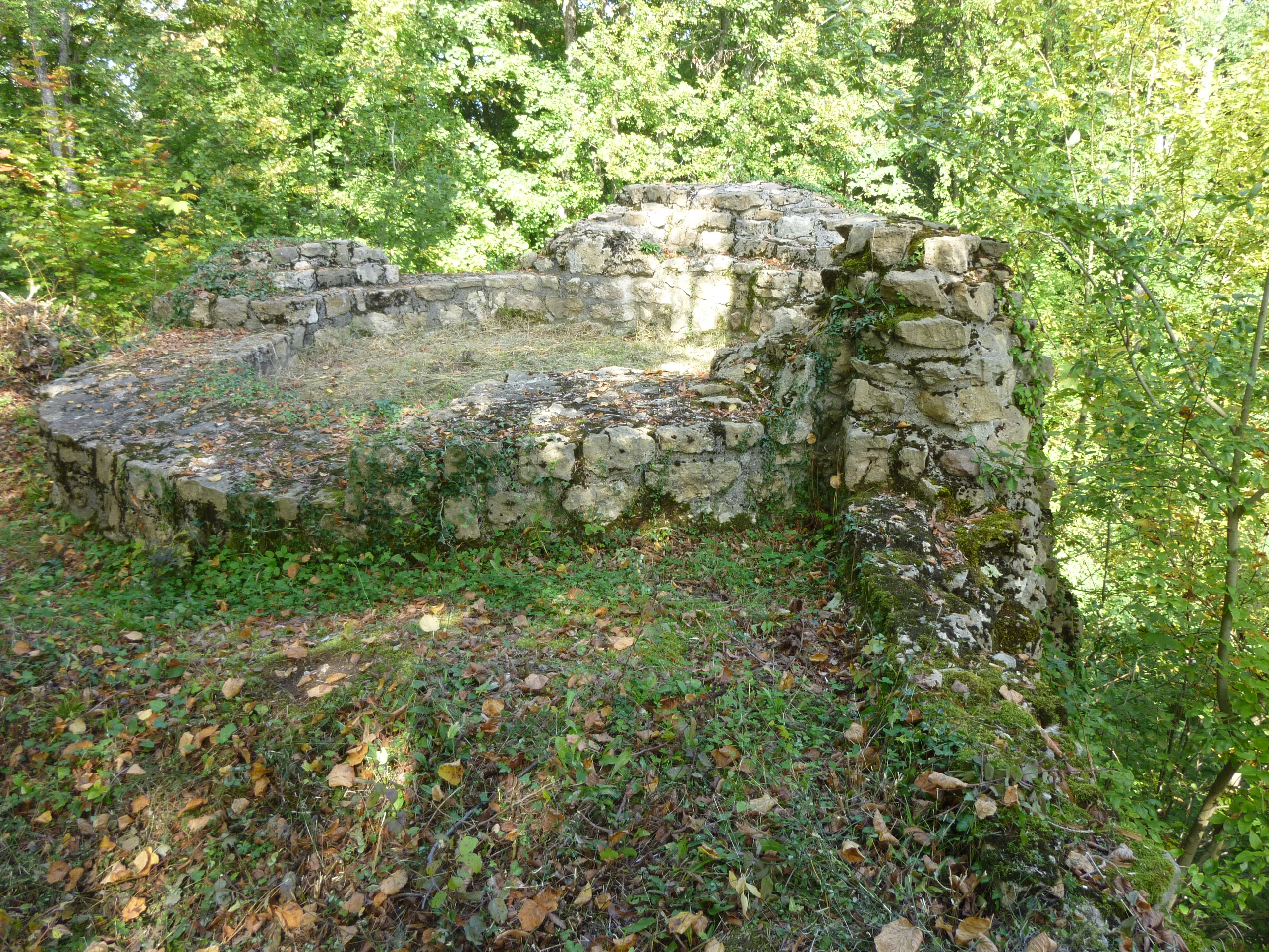 Burgruine Urgiz, Turm ca Ende 13. Jahrhundert